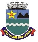 Brasão de Armas do município de São Thomé das Letras, Minas Gerais, Brasil.